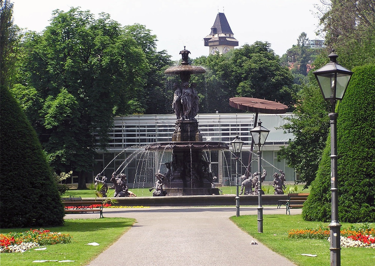 Stadtpark: Eisenbrunnen und Schlossberg - iron-cast fountain and Schlossberg